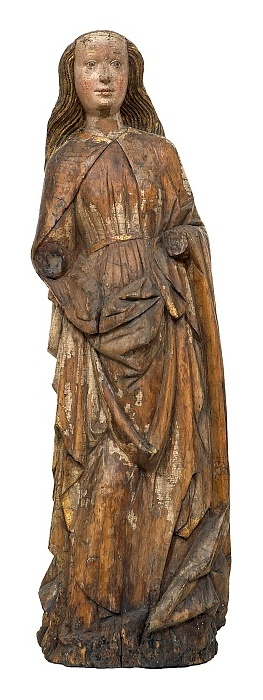 Světice (polovina 15. stol.)